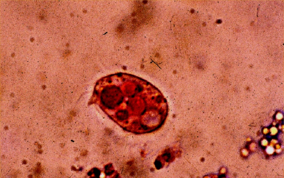 Nivaliella plana, ein sich von Pilzen ernährender bodenbewohnender Ciliat